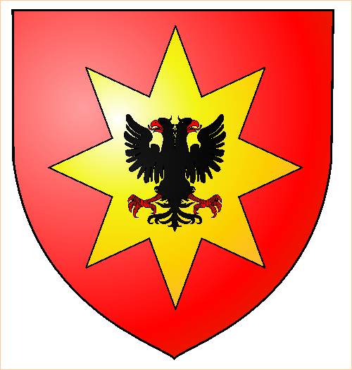 de Sade CoA